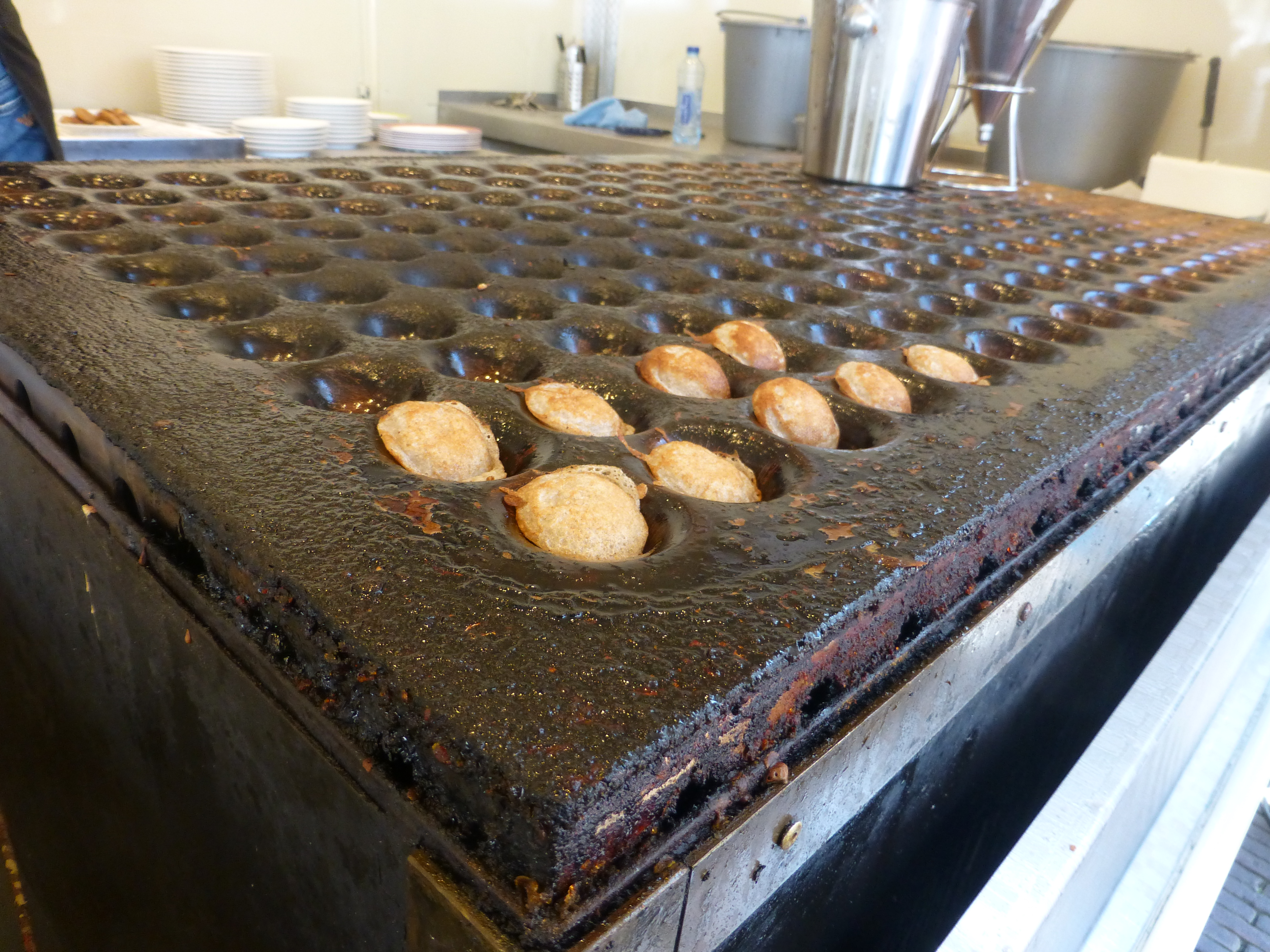 Preparazione dei Poffertijes